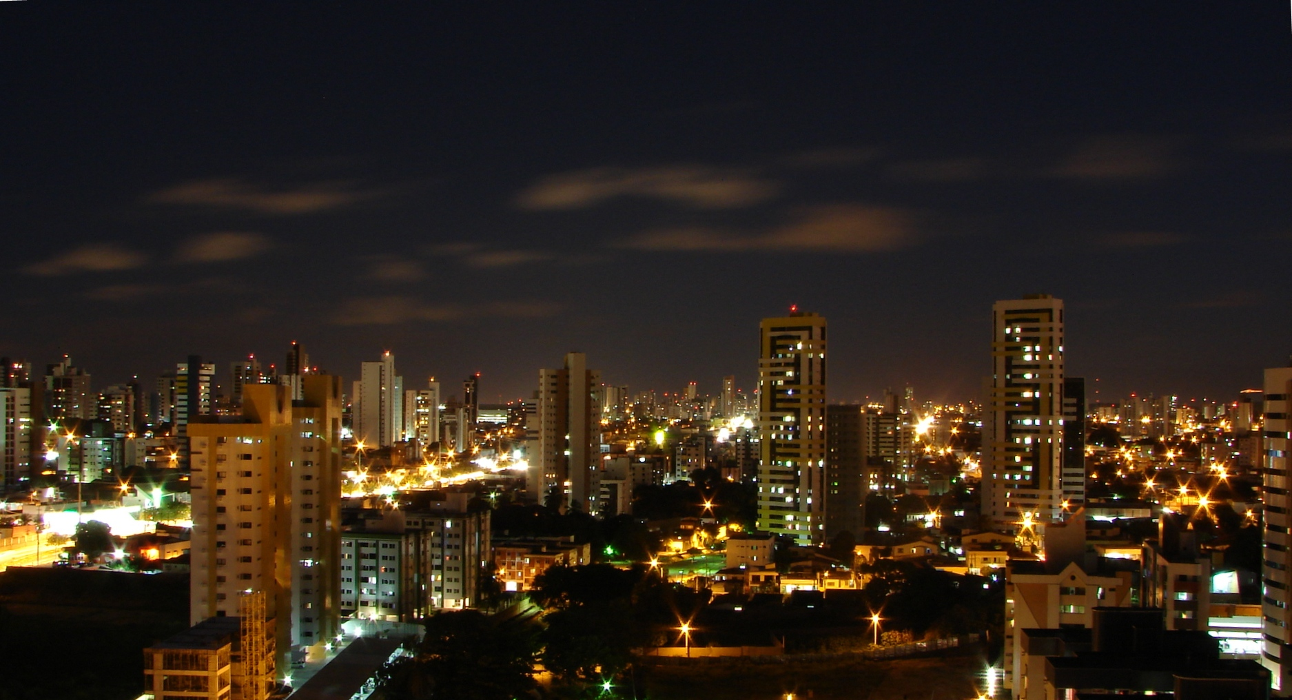 vista noturna da cidade de Natal - RN, Brasil